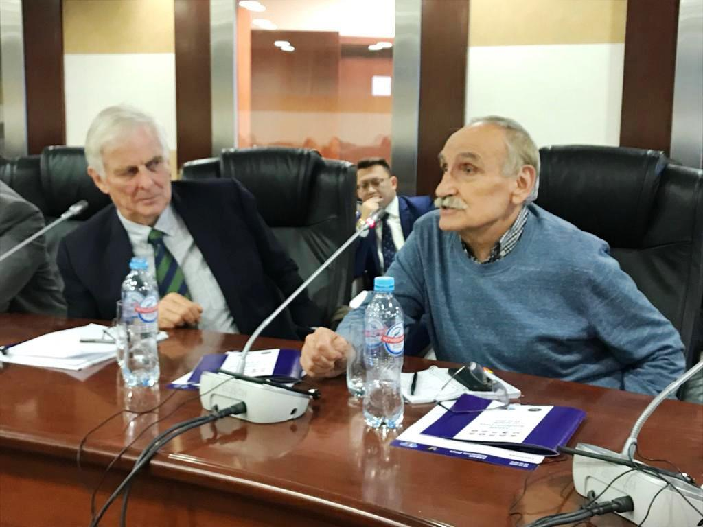 Профессор В.А.Погадаев на круглом столе по проблемам Малайзии в МГИМО 10.10.2019